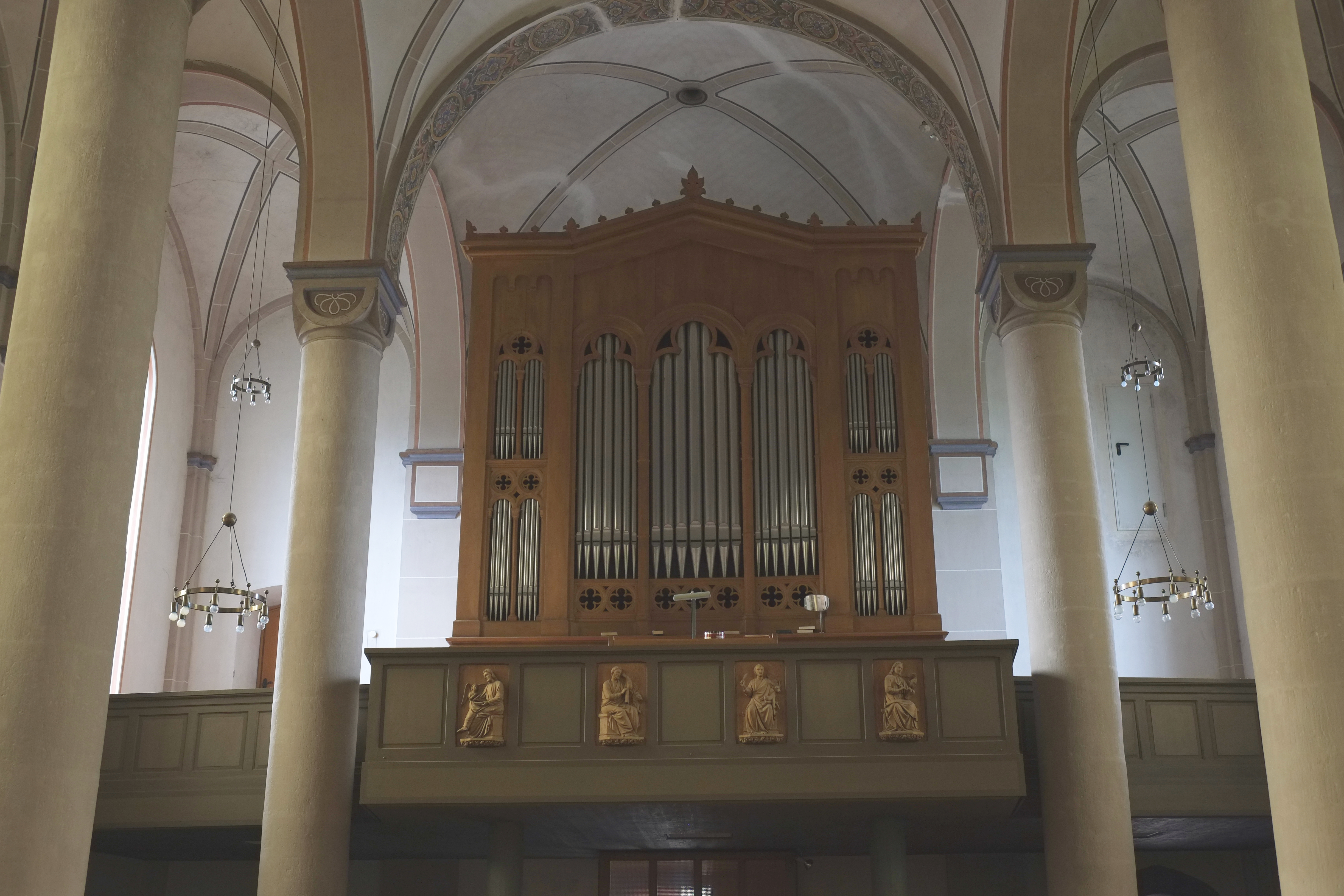 Kirche St. Remigius in Wassenach im Landkreis Ahrweiler (Rheinland-Pfalz)